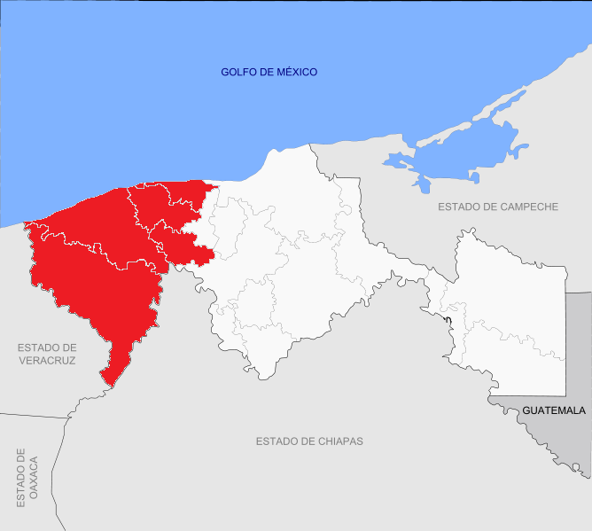 Mapa de la Su Región de la Chontalpa del estado de Tabasco en México